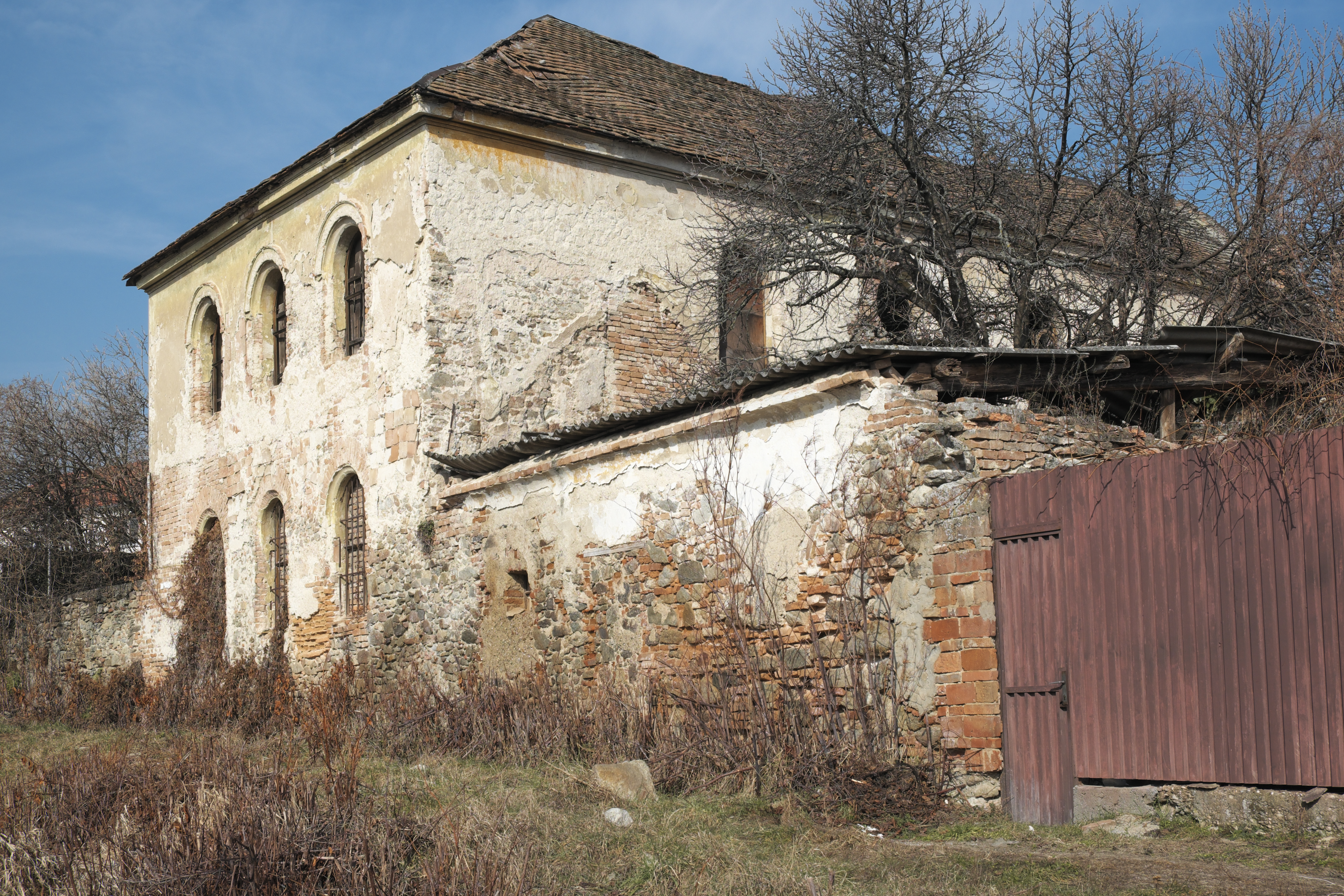 Synagoge in Svätý Jur (Slowakei)